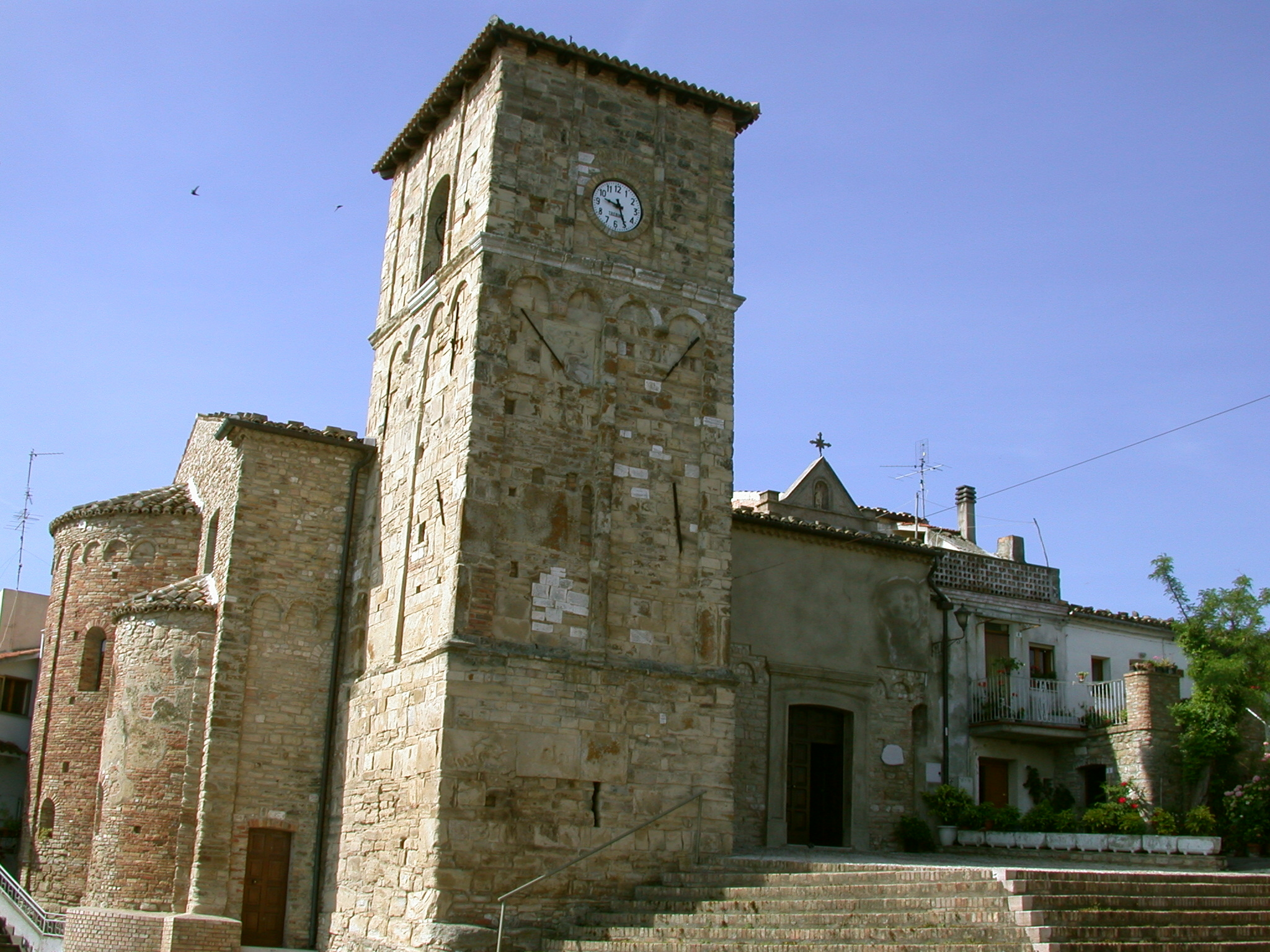 Chiesa di Santa Maria in Petacciato by Antonio Greco